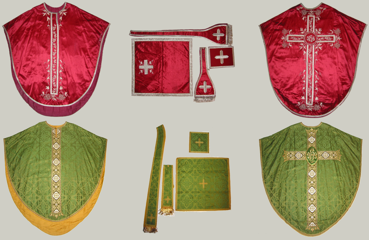 Chasubles et accessoires de forme semi-gothique - Diocèse de Moulins - vers 1890 Mgr de Dreux-Brézé introduisit cette forme d'ornements liturgiques dans son diocèse lors du synode de 1865. Collection privée